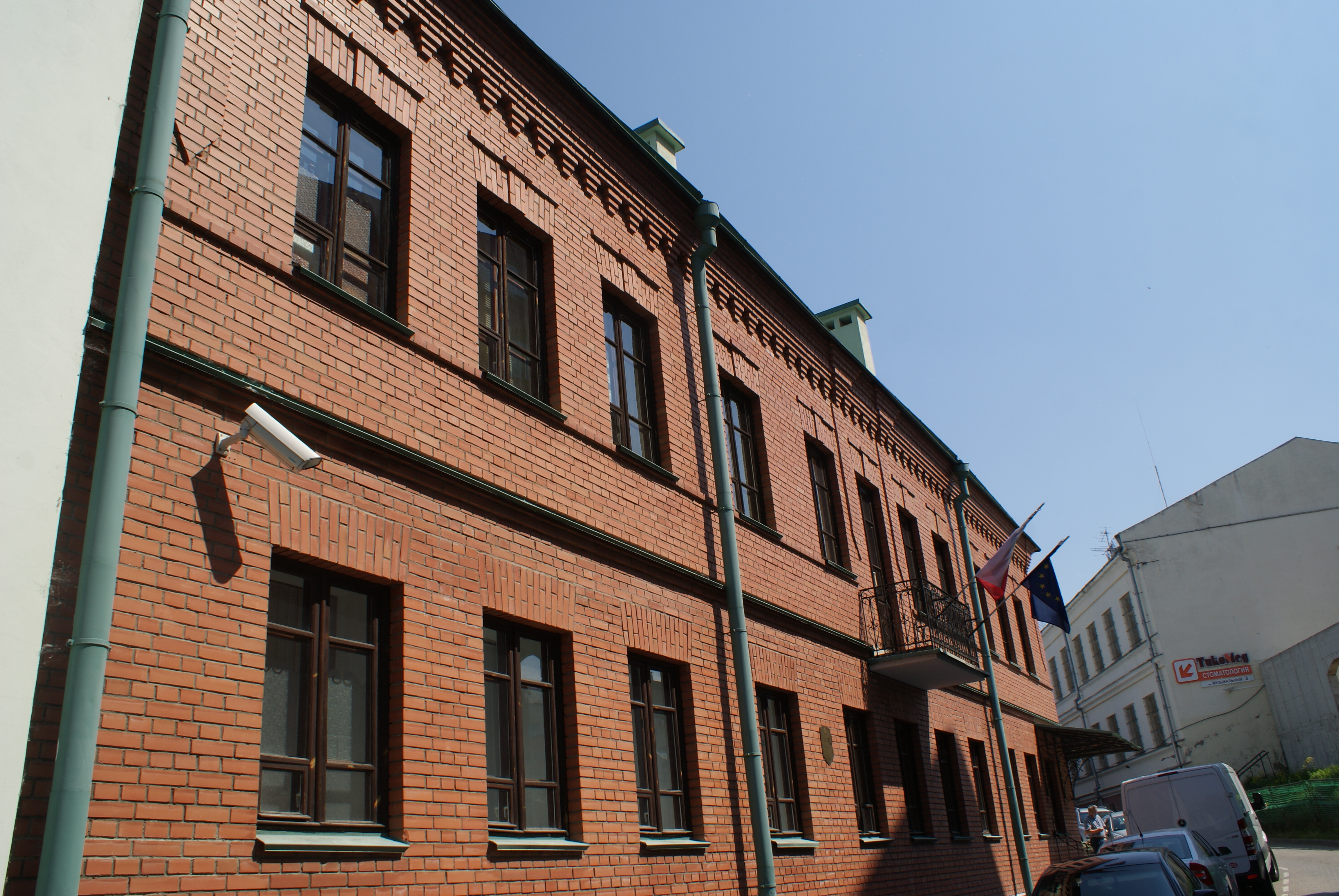 Верхні горад у Мінску